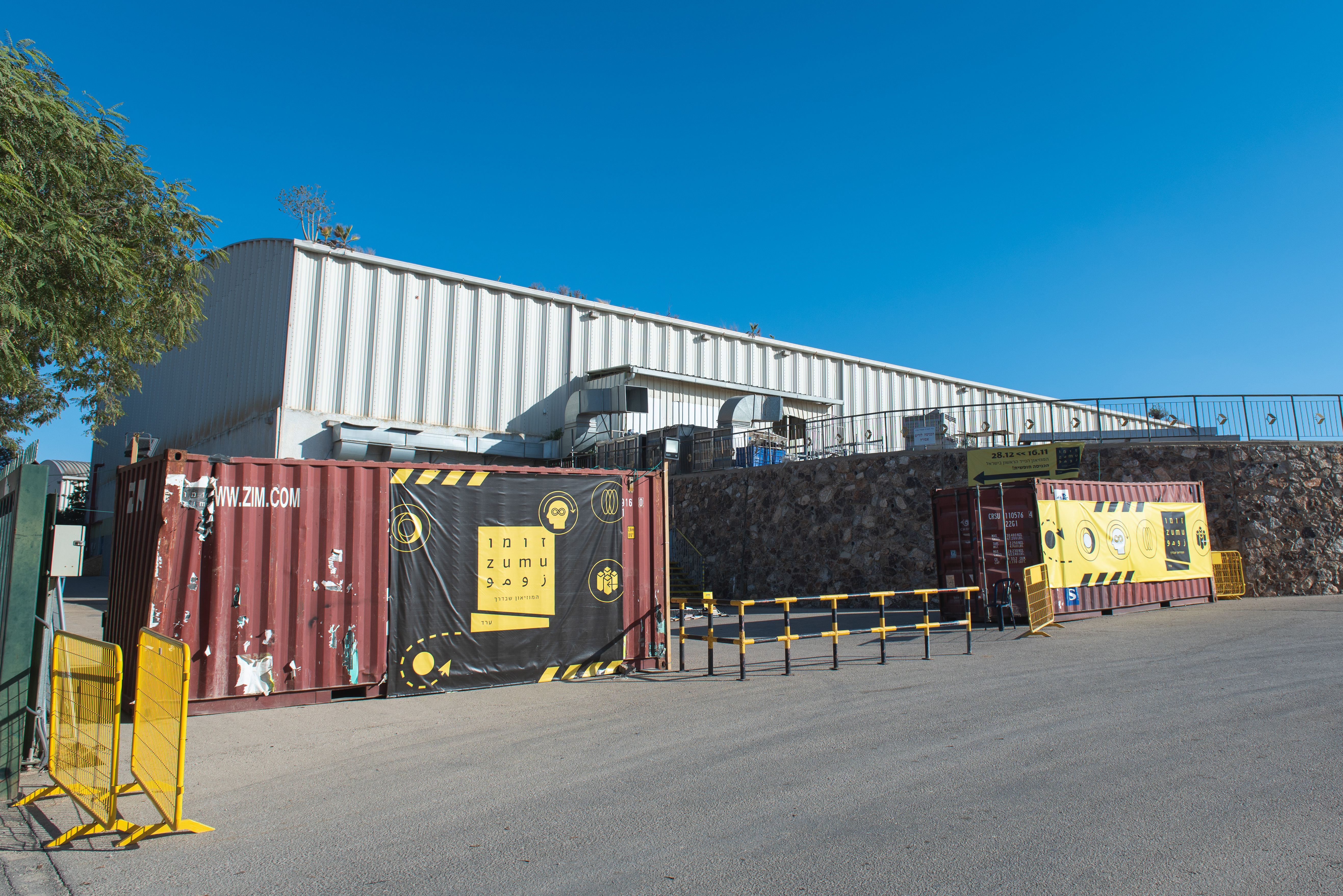 הכניסה לזומו ערד, מפעל מגבות ערד. צילום: יאיר מיוחס